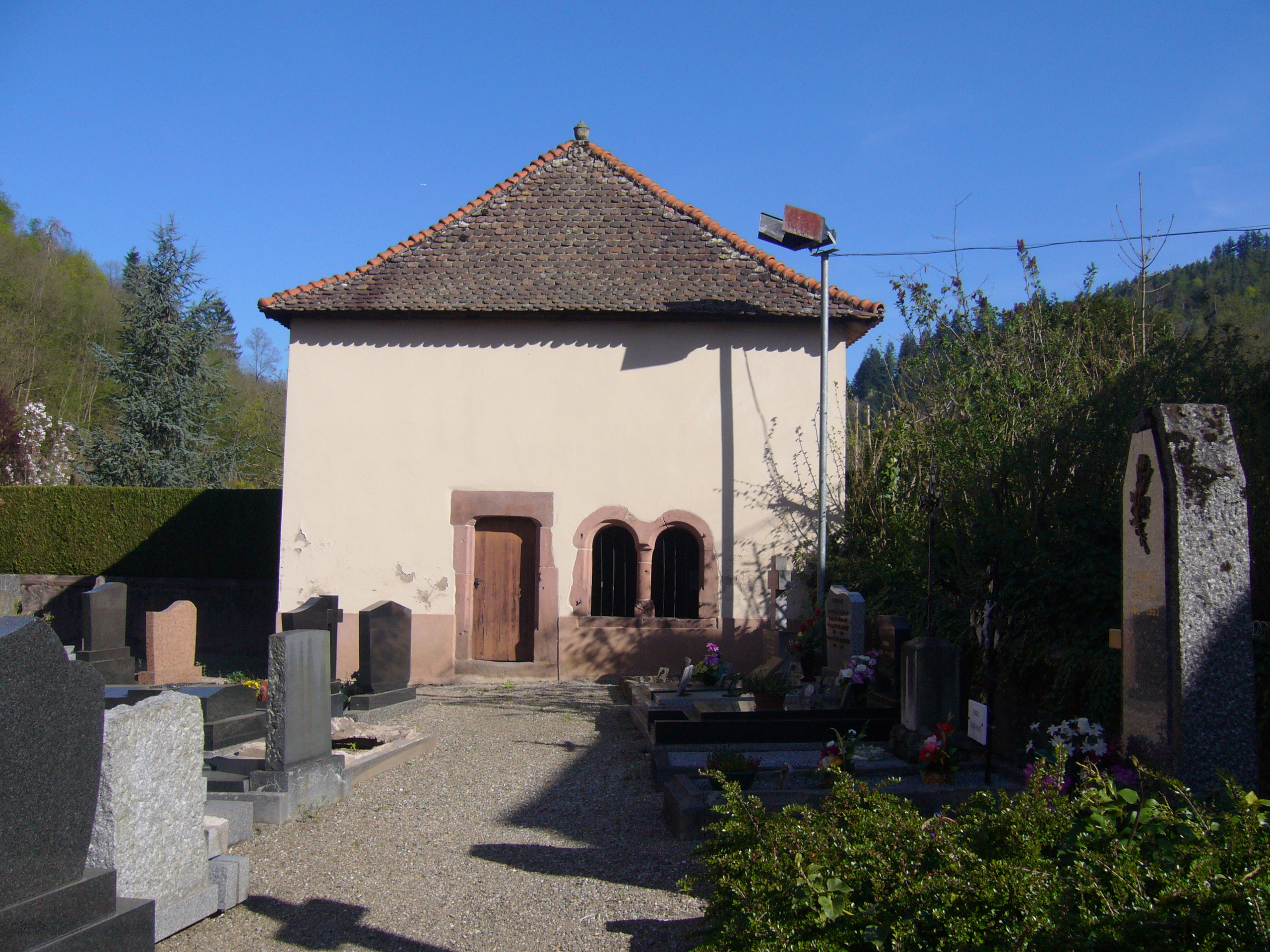 Lièpvre 359.JPG